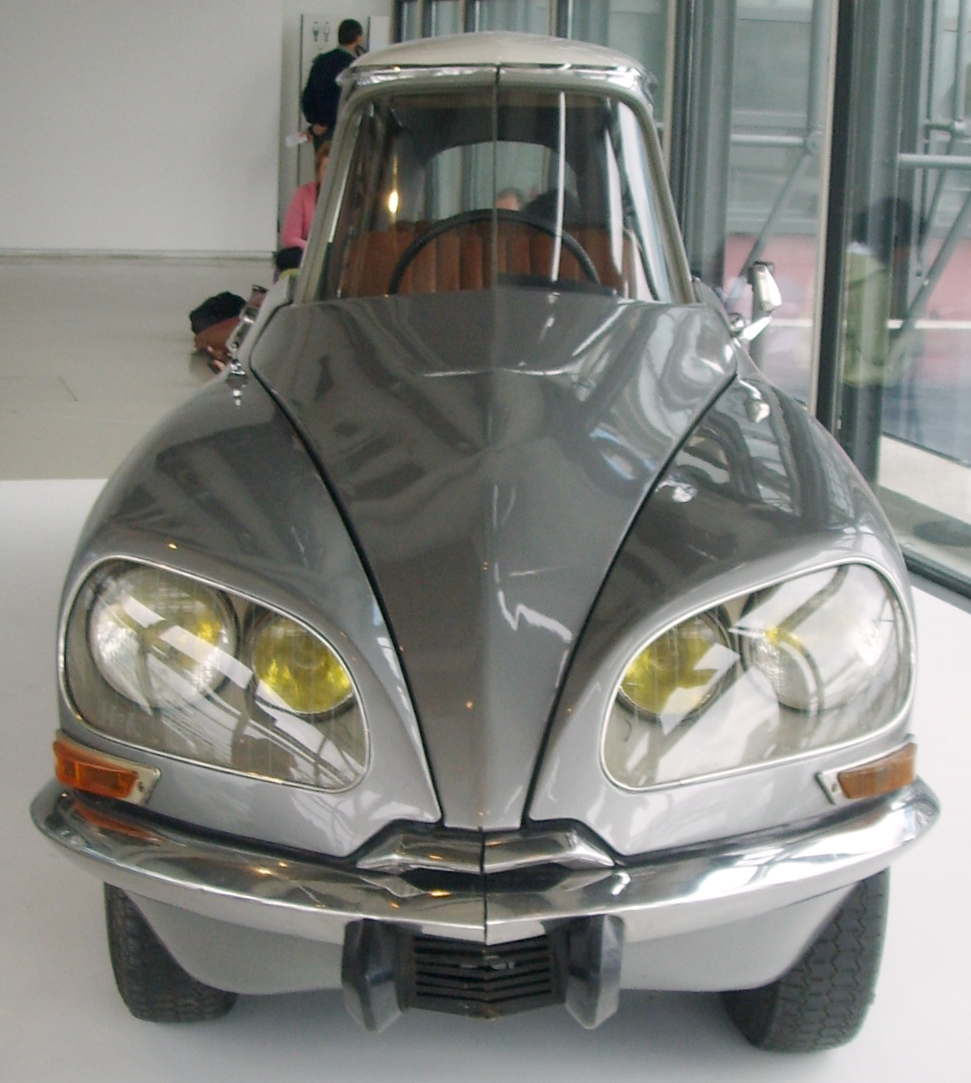 Gabriel Orozco Citroen DS – „La DS“